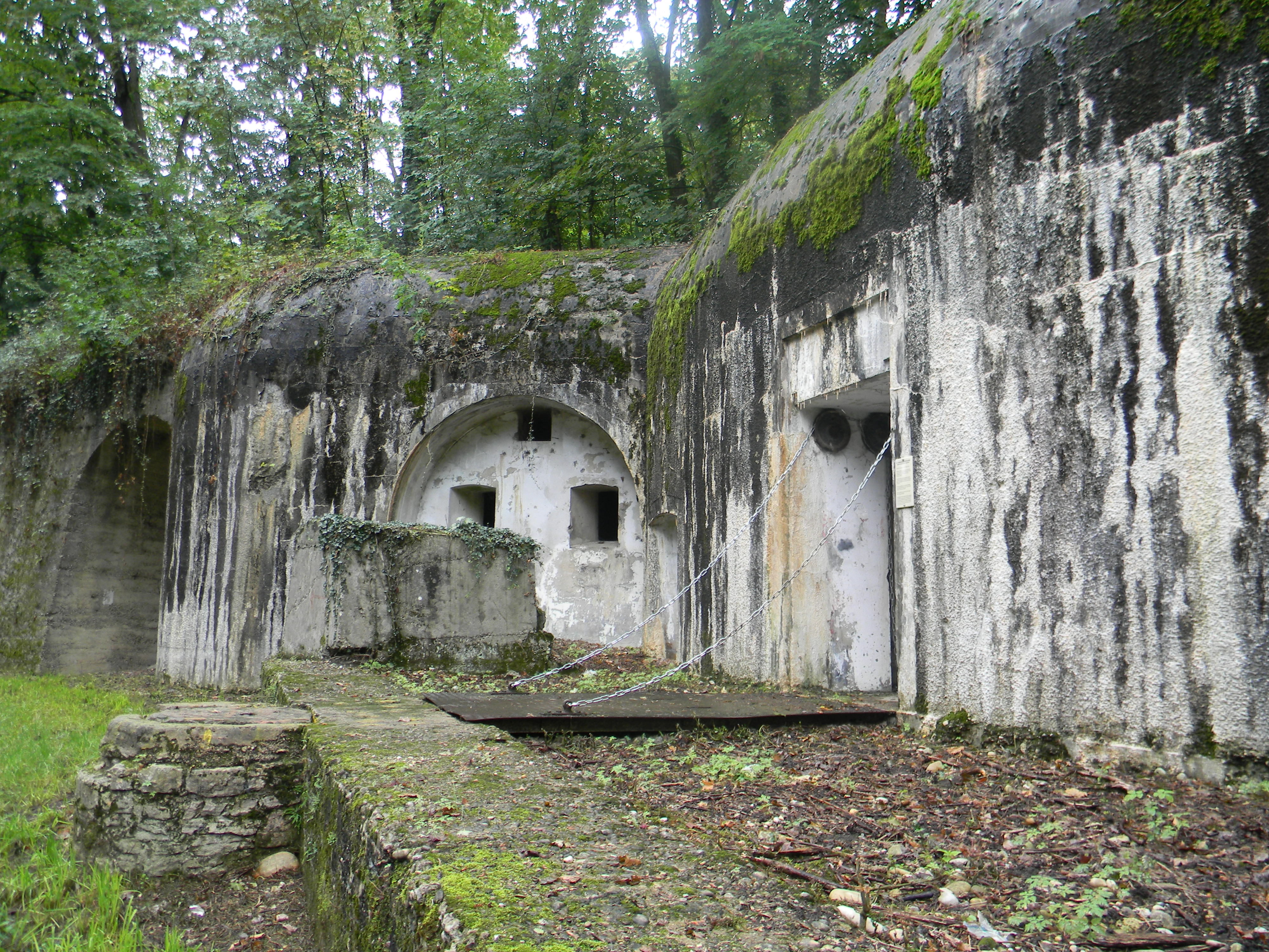 Le coffre de contre-escarpe de flanc droit protégeant le fossé du Fort de Saint-Priest. On distingue le pont-levis enjambant un petit fossé profond d'un mètre cinquante. Le petit mur derrière a été ajouté après la seconde guerre mondiale afin de détruire les munitions qui n'ont pas explosé.